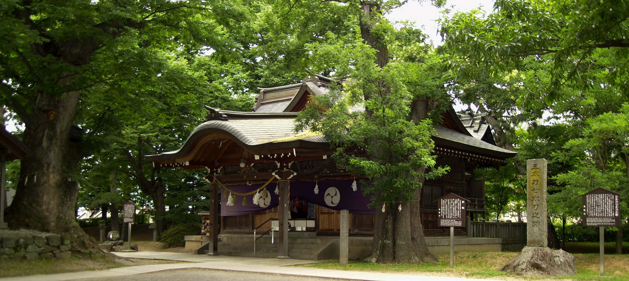 Hachiman-sha 八幡社 Kawanakajima Kosenjō (Hachiman-para), Nagano 長野県長野市篠ノ井小島田町川中島古戦場（八幡原）